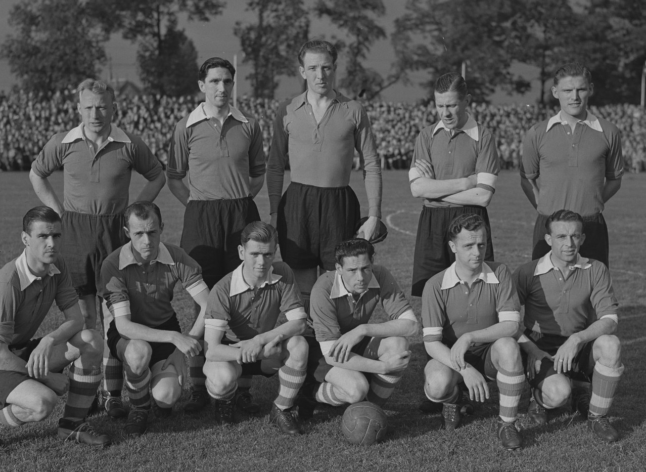 PSV tegen Willem II. PSV elftal.